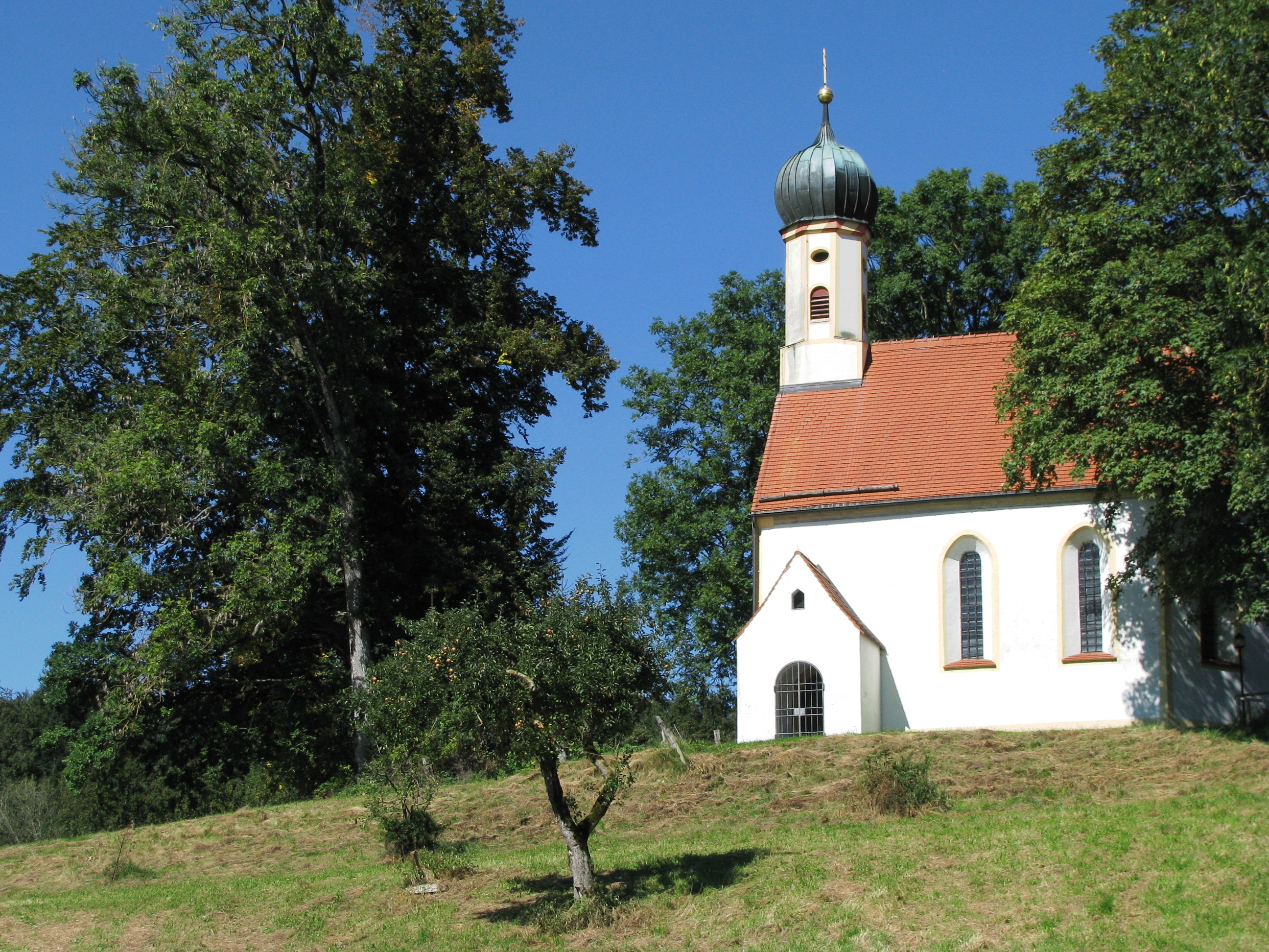 Kath. Filialkirche St. Koloman, spätgotischer Saalraum mit poygonalem Chorschluss und Zwiebel-Dachreiter, 1. Hälfte 16. Jh., 17./18. Jh. verändert This is a photograph of an architectural monument.